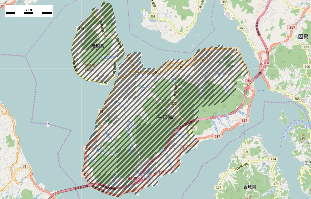 広島県の旧豊田郡瀬戸田町域の目安 This map may be incomplete, and may contain errors. Don't rely solely on it for navigation.